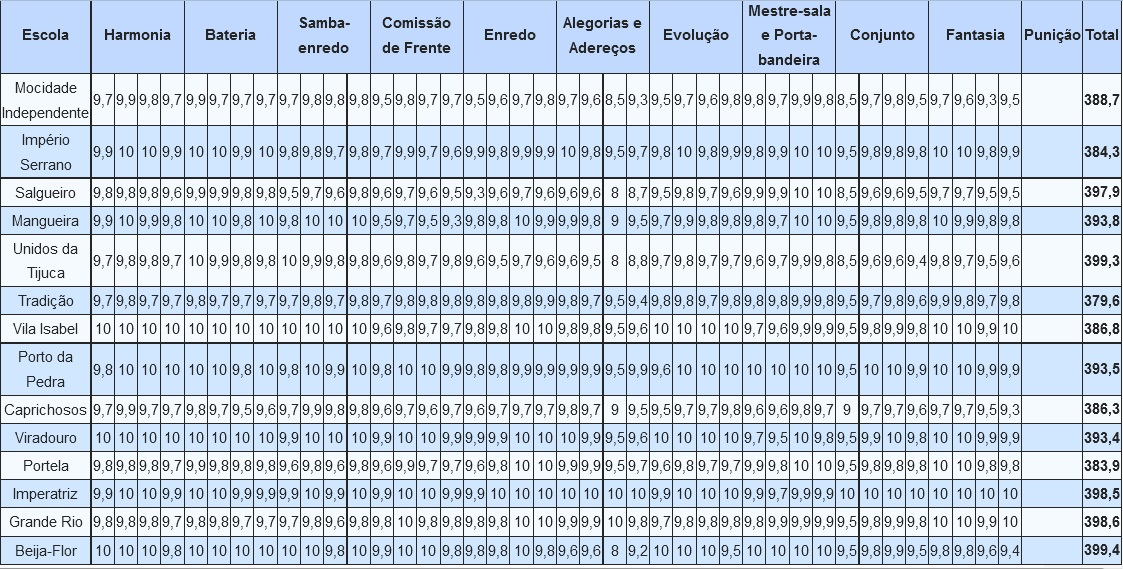 Resultados do Carnaval do Rio - 2005